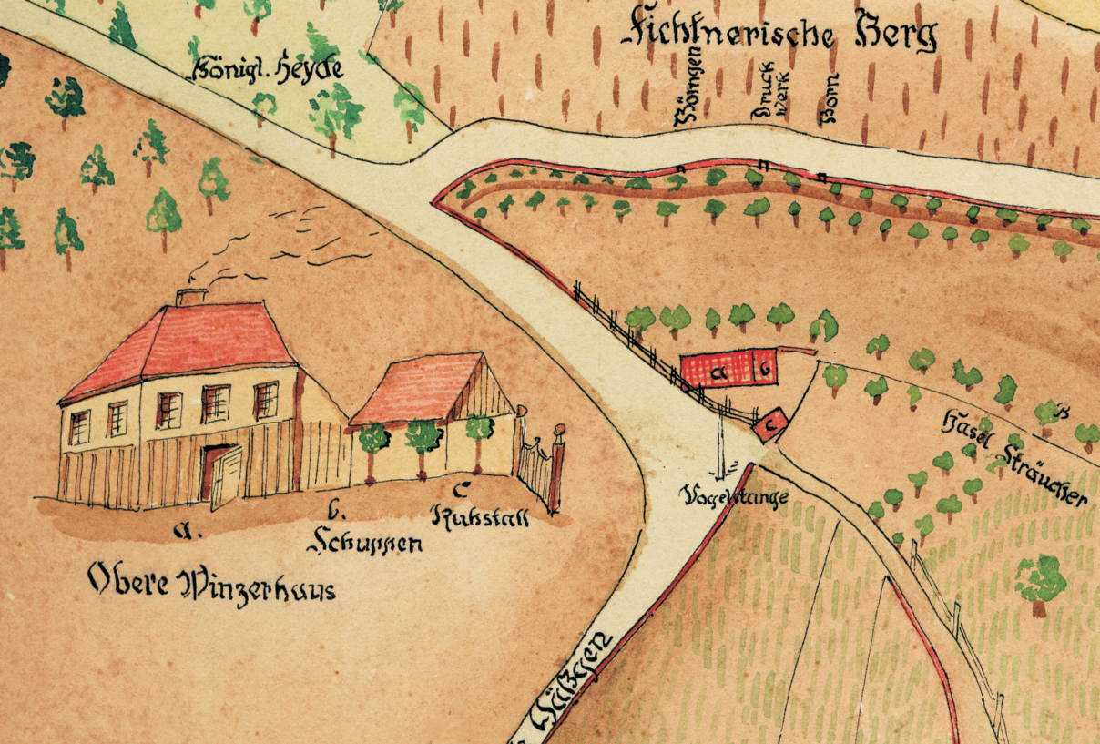 Minckwitzscher Weinberg, Oberes Winzerhaus, Ausschnitt aus dem Koberschen Plan, 18. Jahrhundert